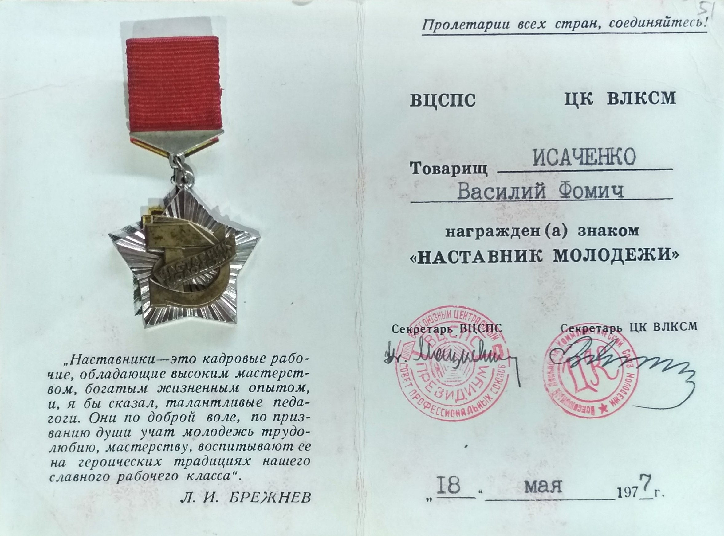 Удостоверение к знаку «Наставник молодёжи». Экспозиция Благовещенского краеведческого музея